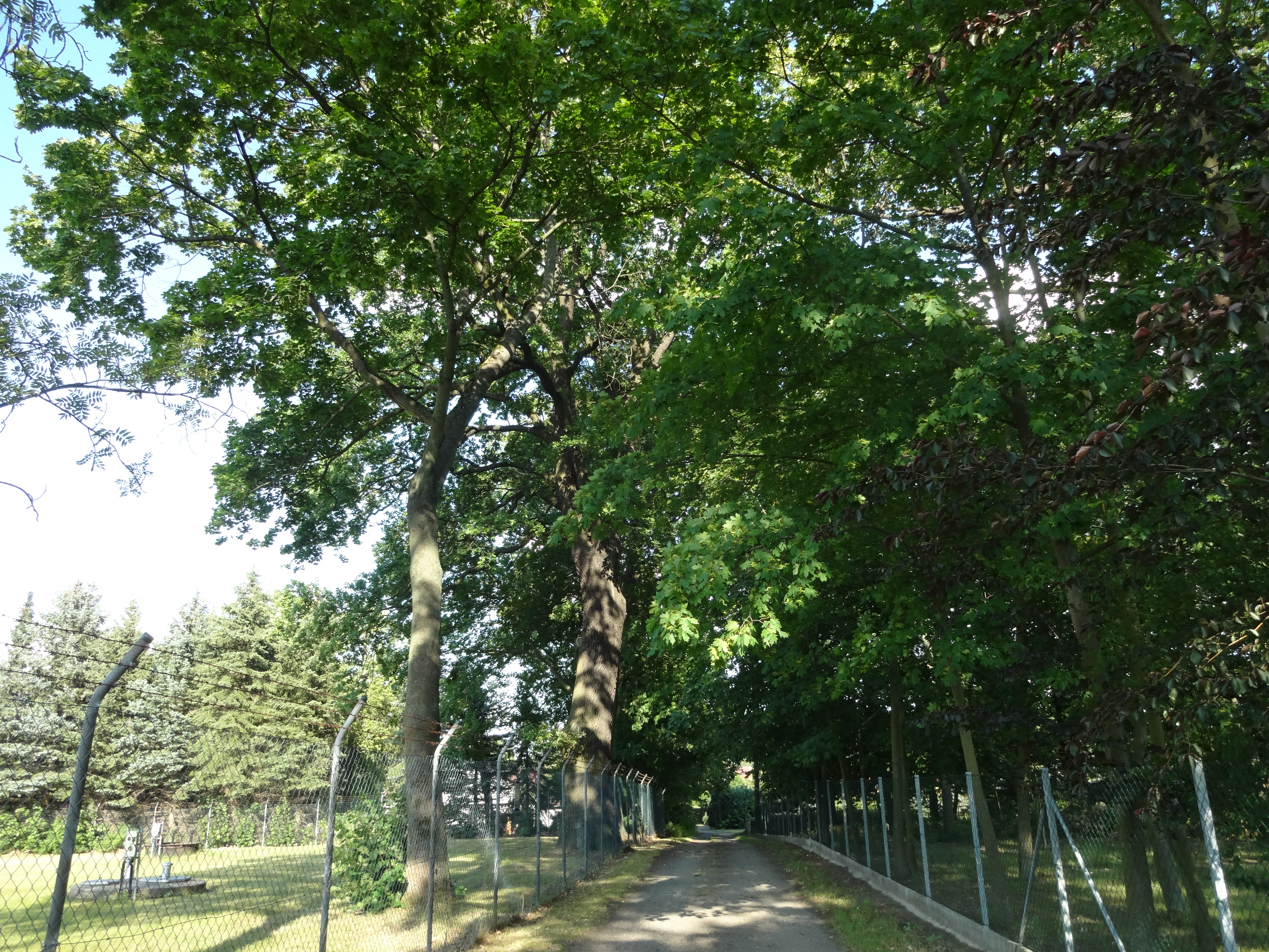 als Naturdenkmal geschützte Stieleiche in Bronkow im Zaun der Wasserwirtschaft